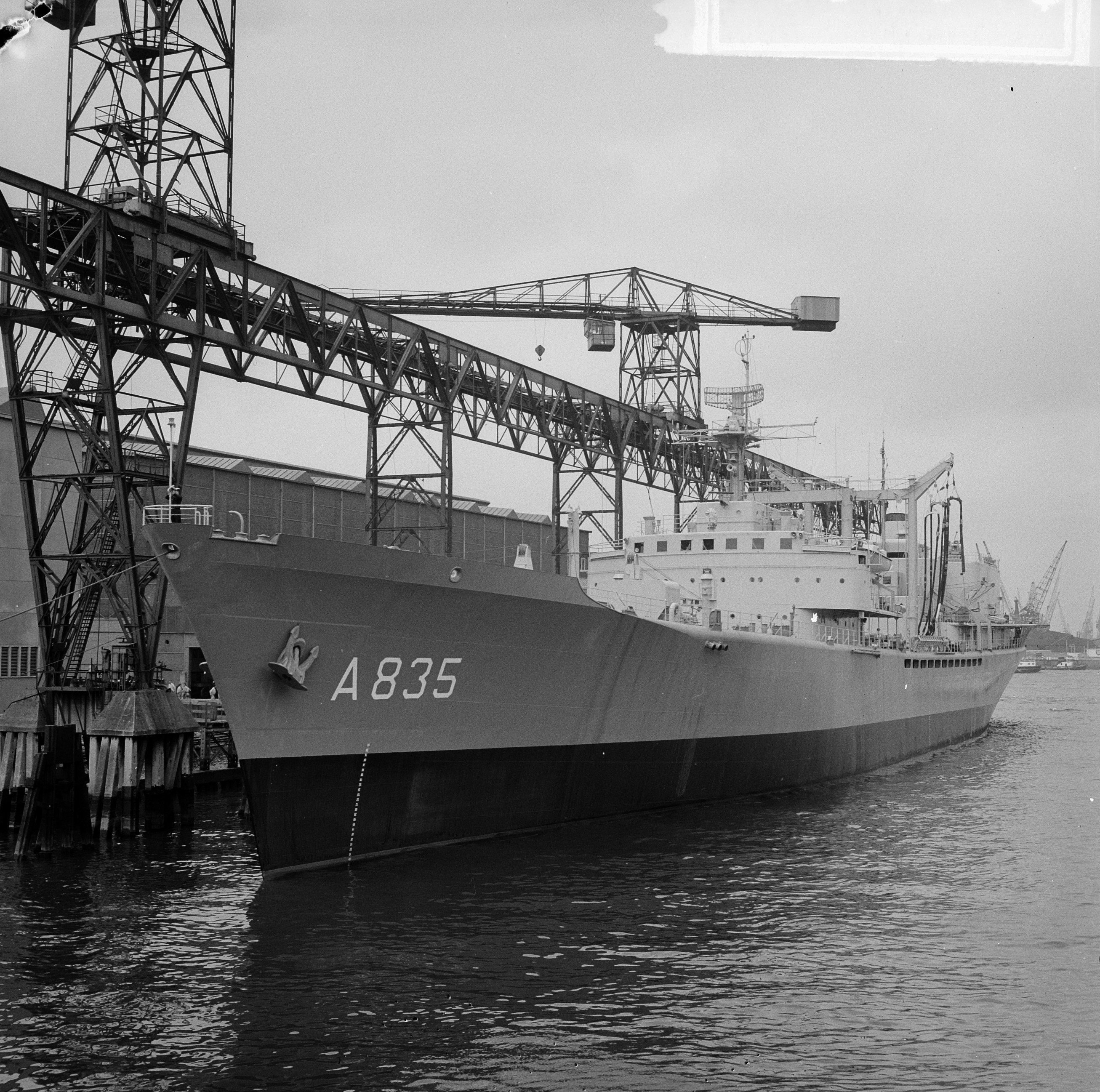 Collectie / Archief : Fotocollectie Anefo Reportage / Serie : [ onbekend ] Beschrijving : Bevoorradingsschip voor de Koninklijke Marine de Poolster bij de steiger van de RDM Datum : 10 september 1964 Instellingsnaam : RDM Fotograaf : Koch, Eric / Anefo Auteursrechthebbende : Nationaal Archief Materiaalsoort : Negatief (zwart/wit) Nummer archiefinventaris : bekijk toegang 2.24.01.03 Bestanddeelnummer : 916-8616